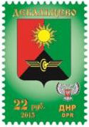 Герб Дебальцево на почтовой марке